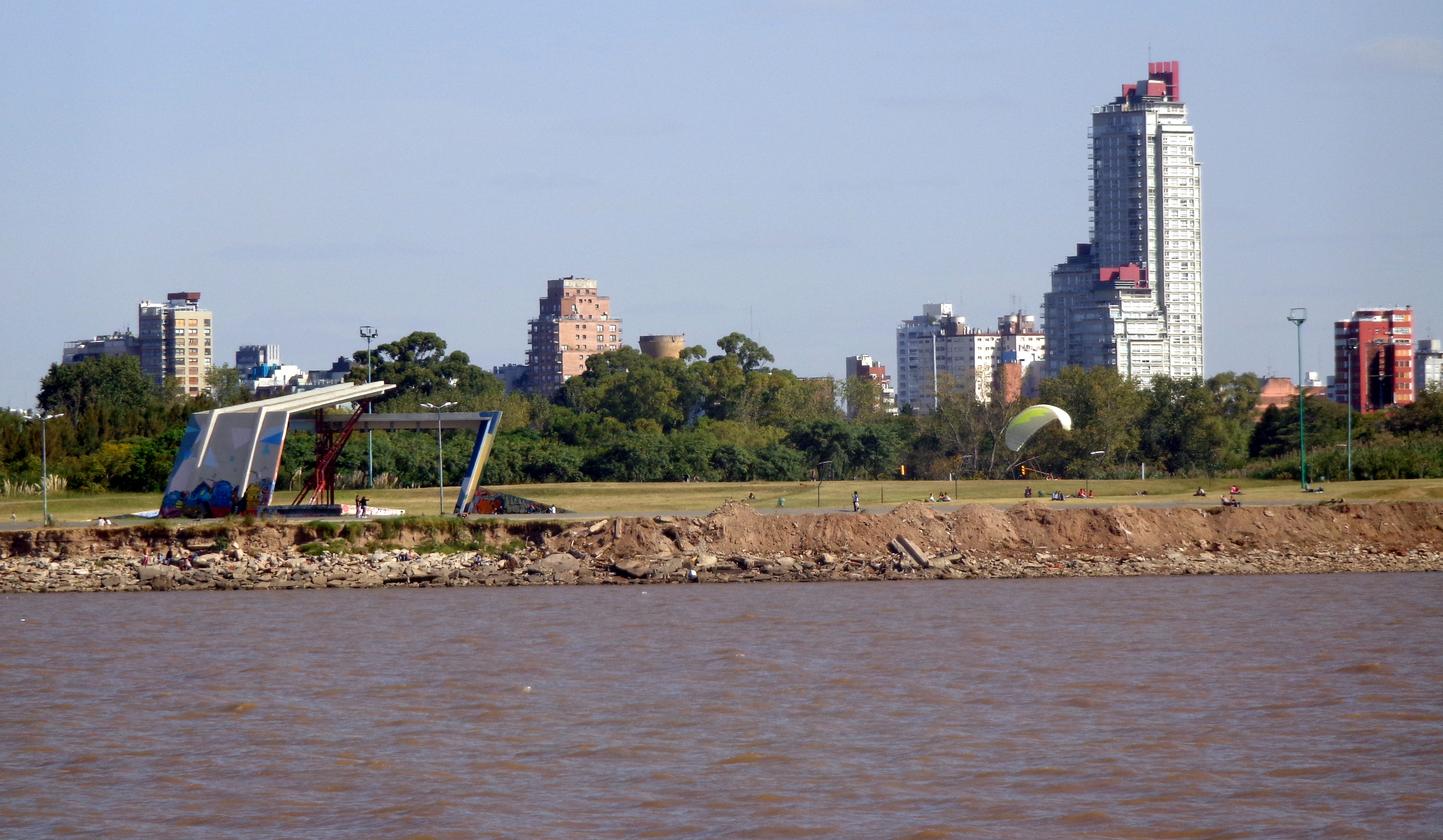 Anfiteátro Arturo Illia visto desde el Río de la Plata, en Vicente López, provincia de Buenos Aires, Argentina. Las torres Centennial (Sespede Arquitectos, 1997-2001) se aprecian en el último plano de la foto.